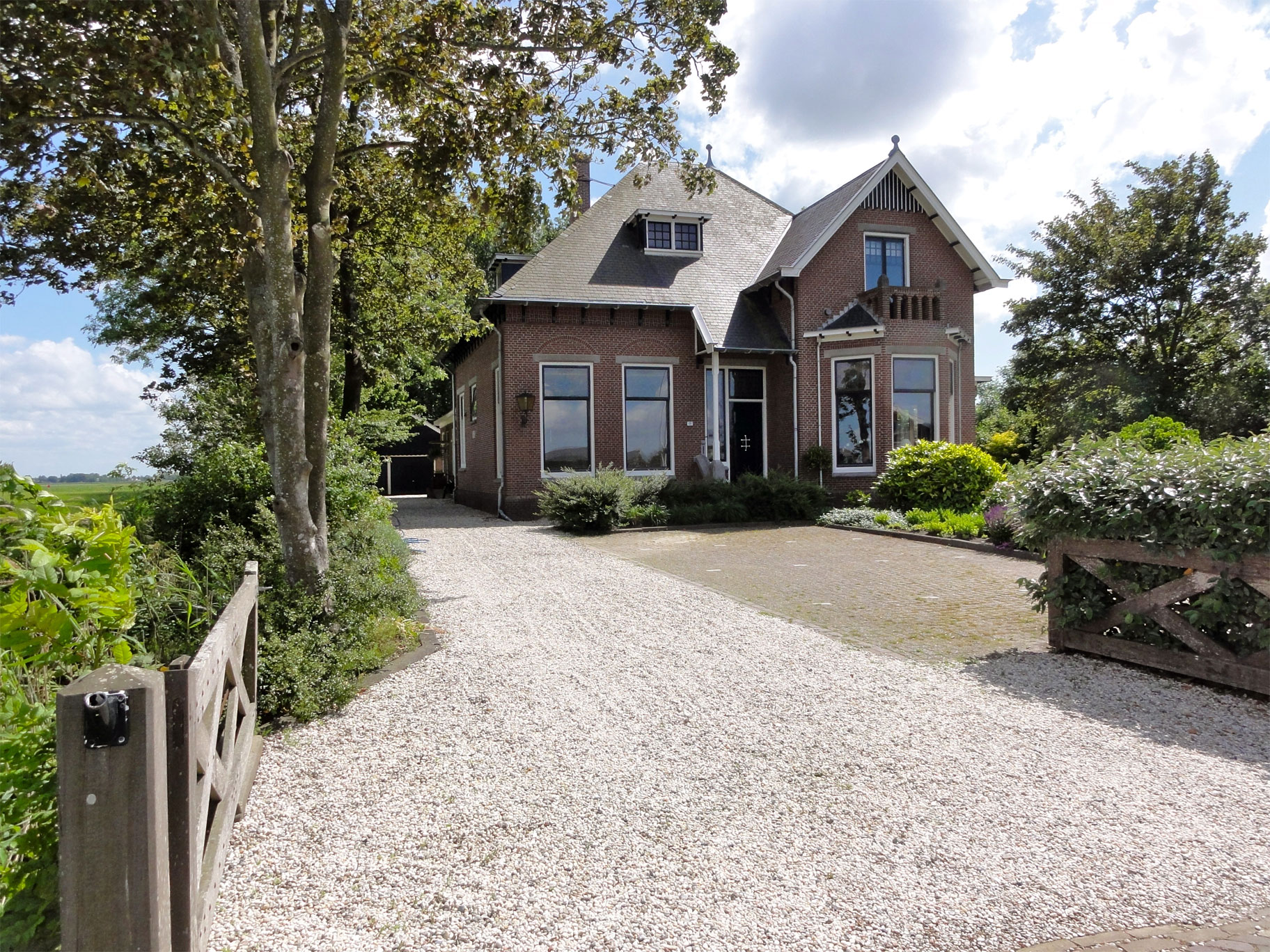 Oosteinde 106 in Sint-Jacobiparochie